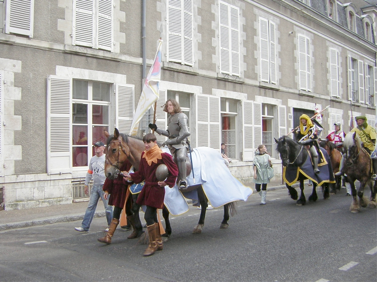 Fêtes de Jeanne d'Arc à Orléans (Loiret)